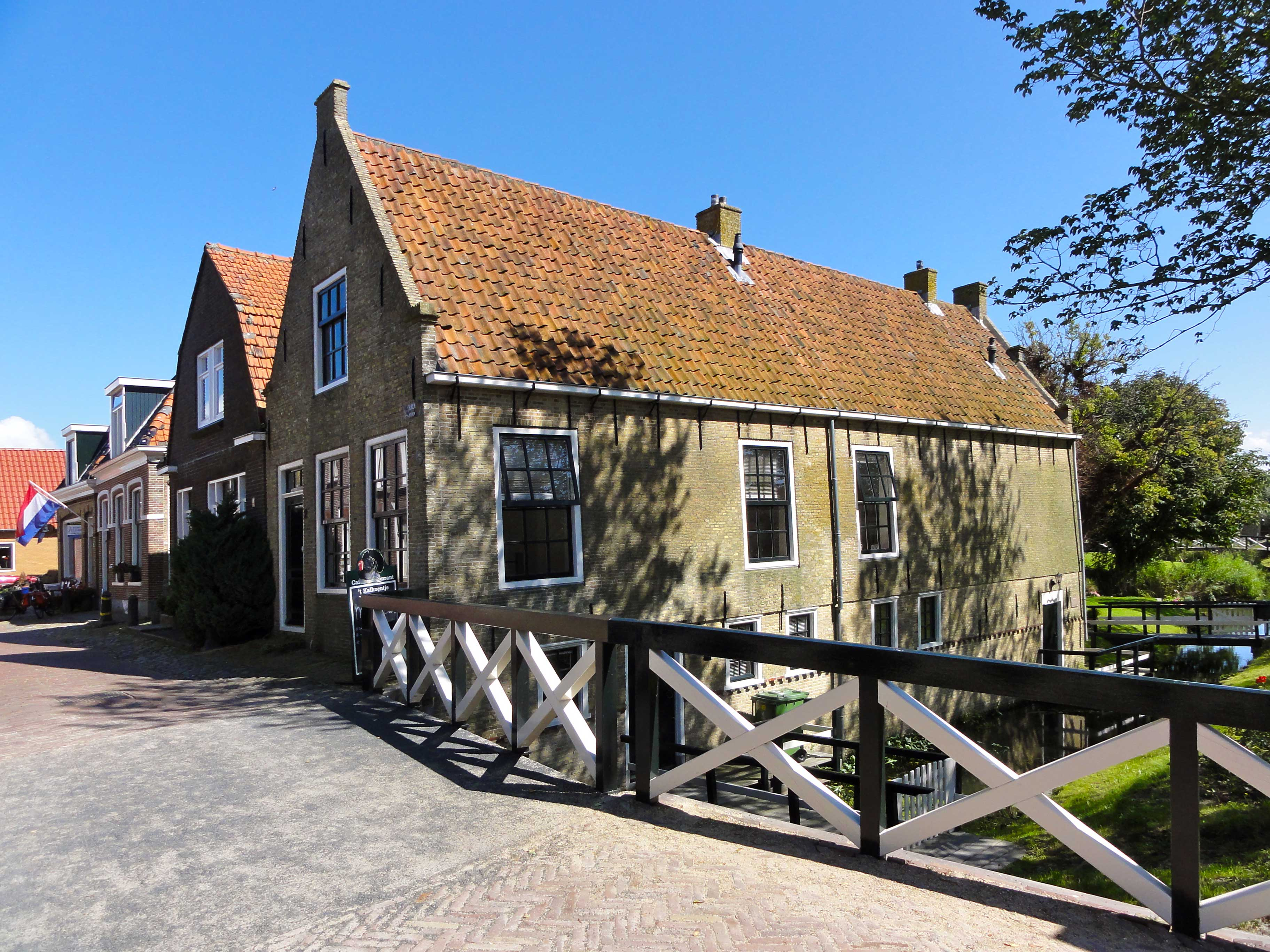 Buren 2 te Hindeloopen